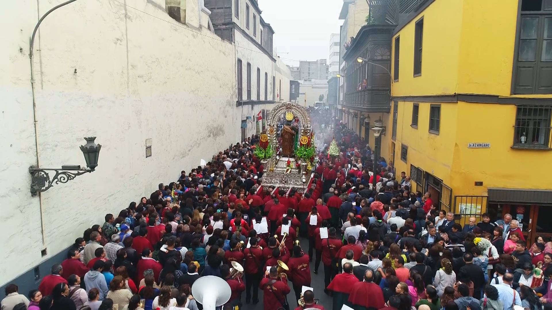 Junto a la multitud de fieles que lo acompañaron a los Barrios Altos